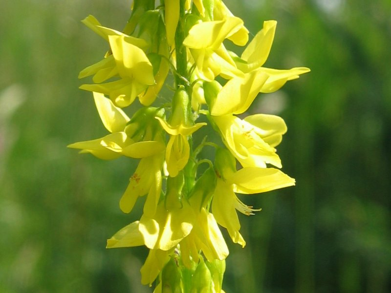 Echter Steinklee Melilotus officinalis, Zingst